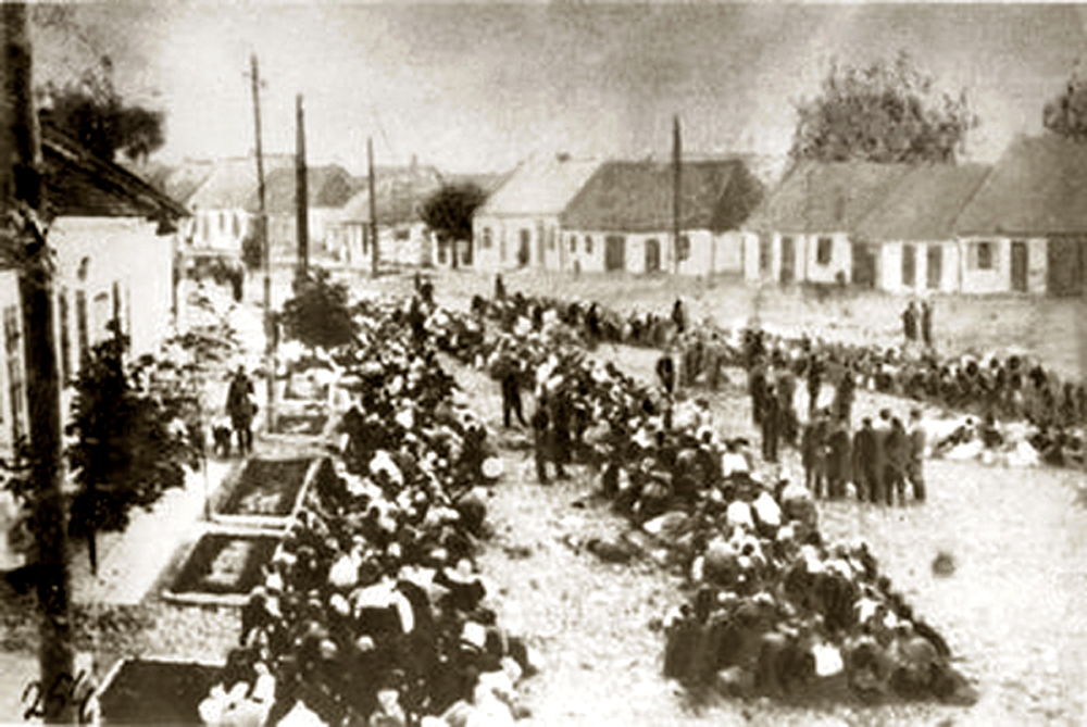 Likwidacja getta kieleckiego. Ulica Starowarszawska.